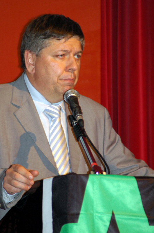 Jo Vandeurzen